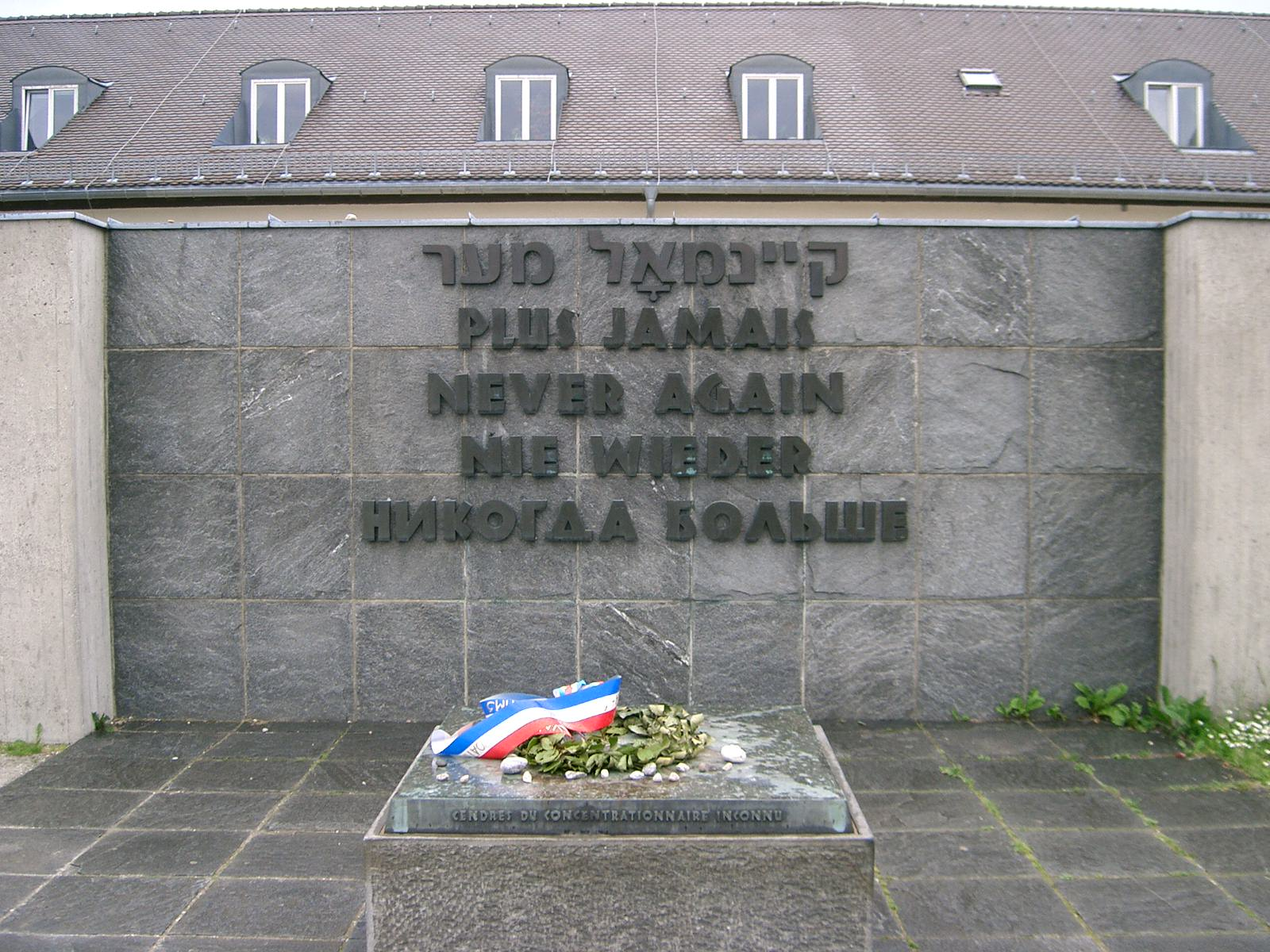 Never Again